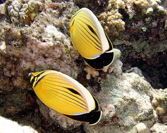 Chaetodon austriacus